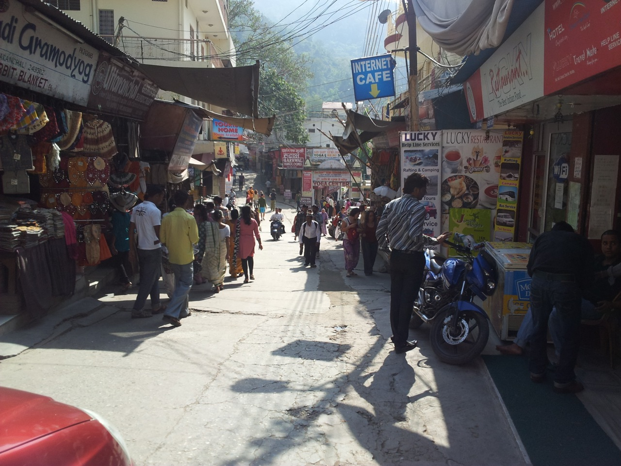 Rishikesh